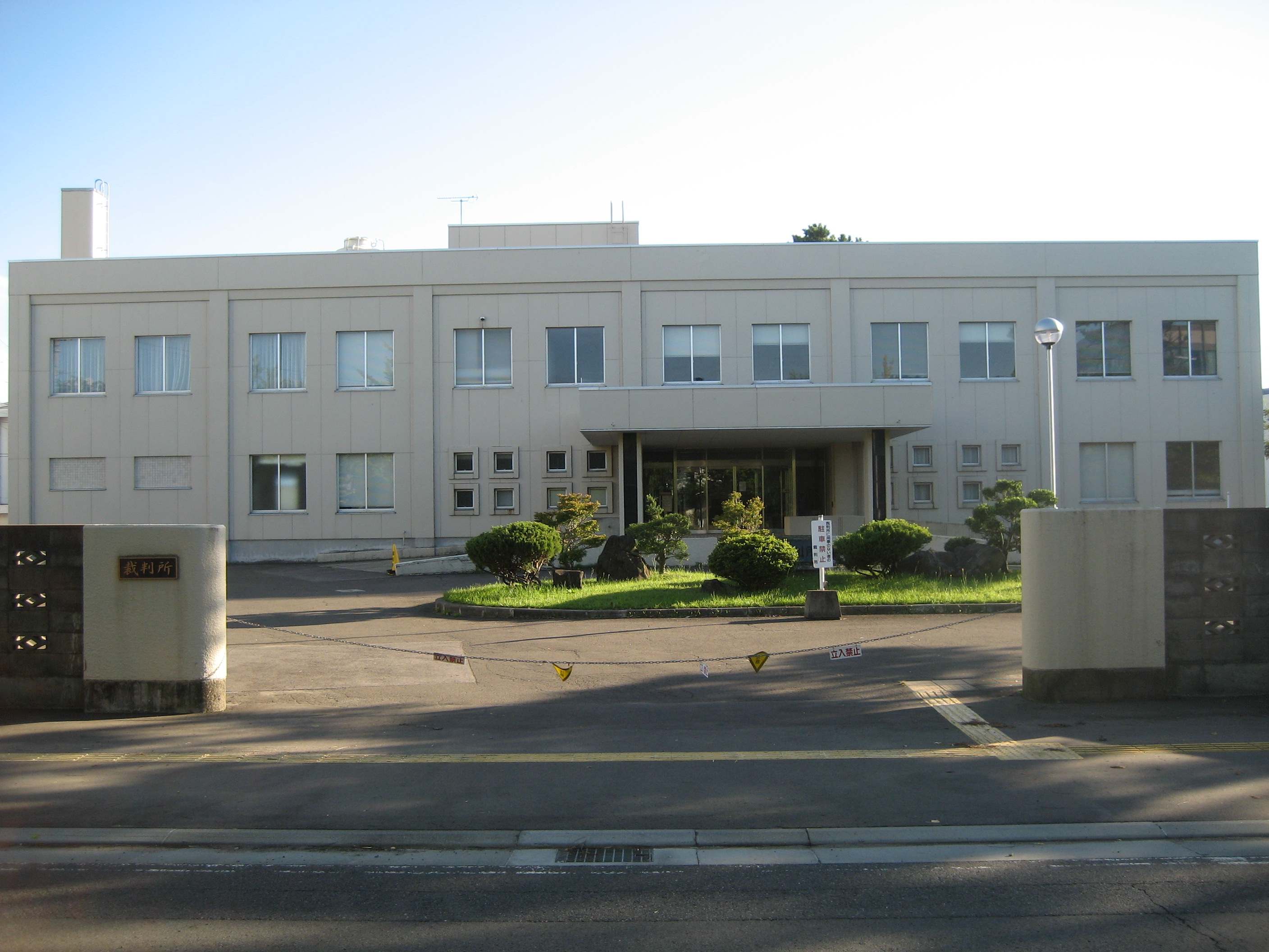 秋田地方裁判所能代支部・能代簡易裁判所